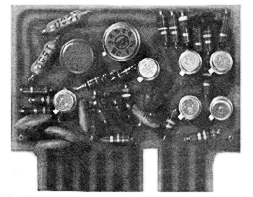 Discrete Op Amp